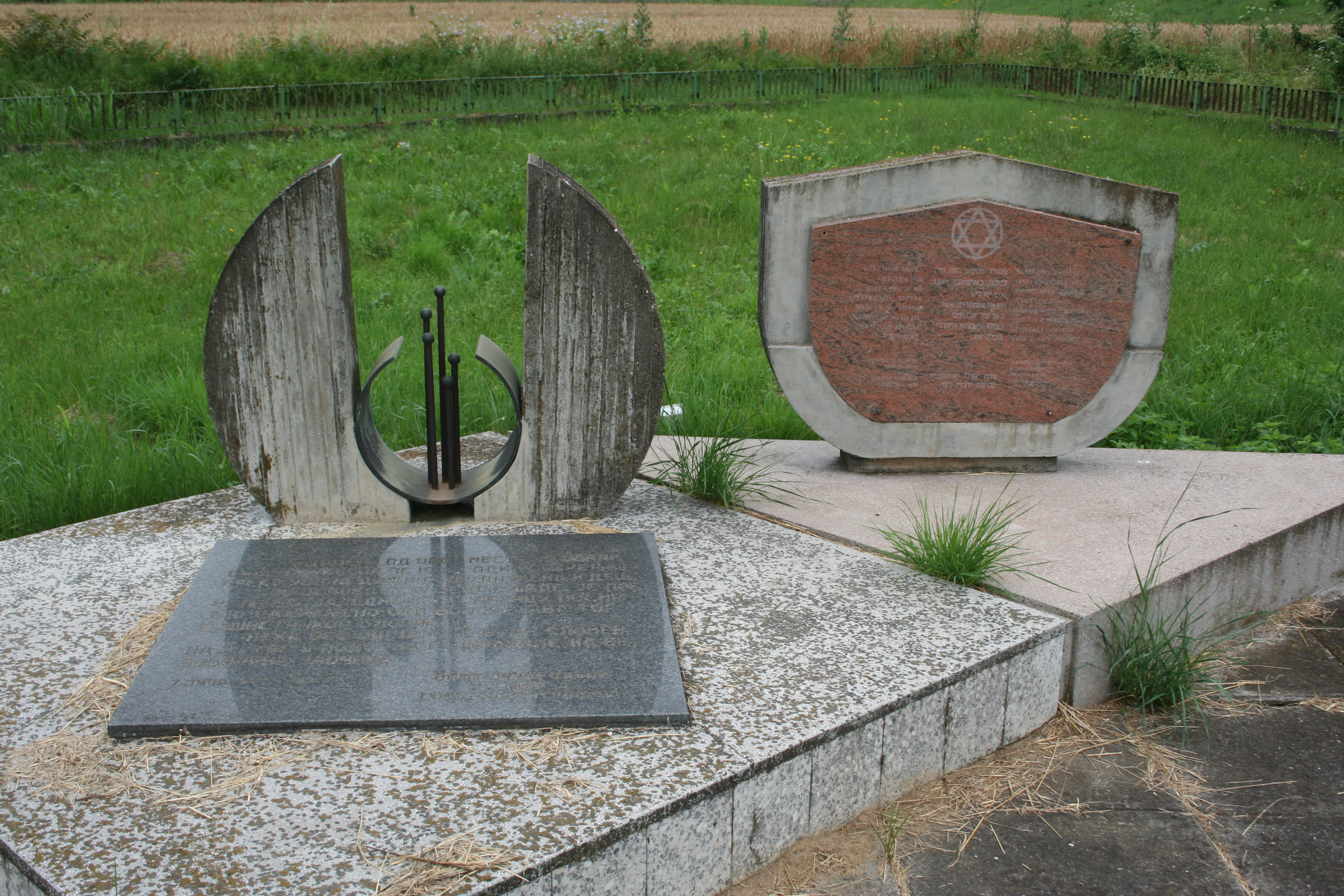 Spomen groblje žrtava terora u Drugom svetskom ratu, Mačvanska Mitrovica